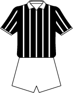 DescriÃ§Ã£o IlustraÃ§Ã£o do uniforme do Vila Isabel Futebol Clube, cidade do Rio de Janeiro. LicenÃ§a